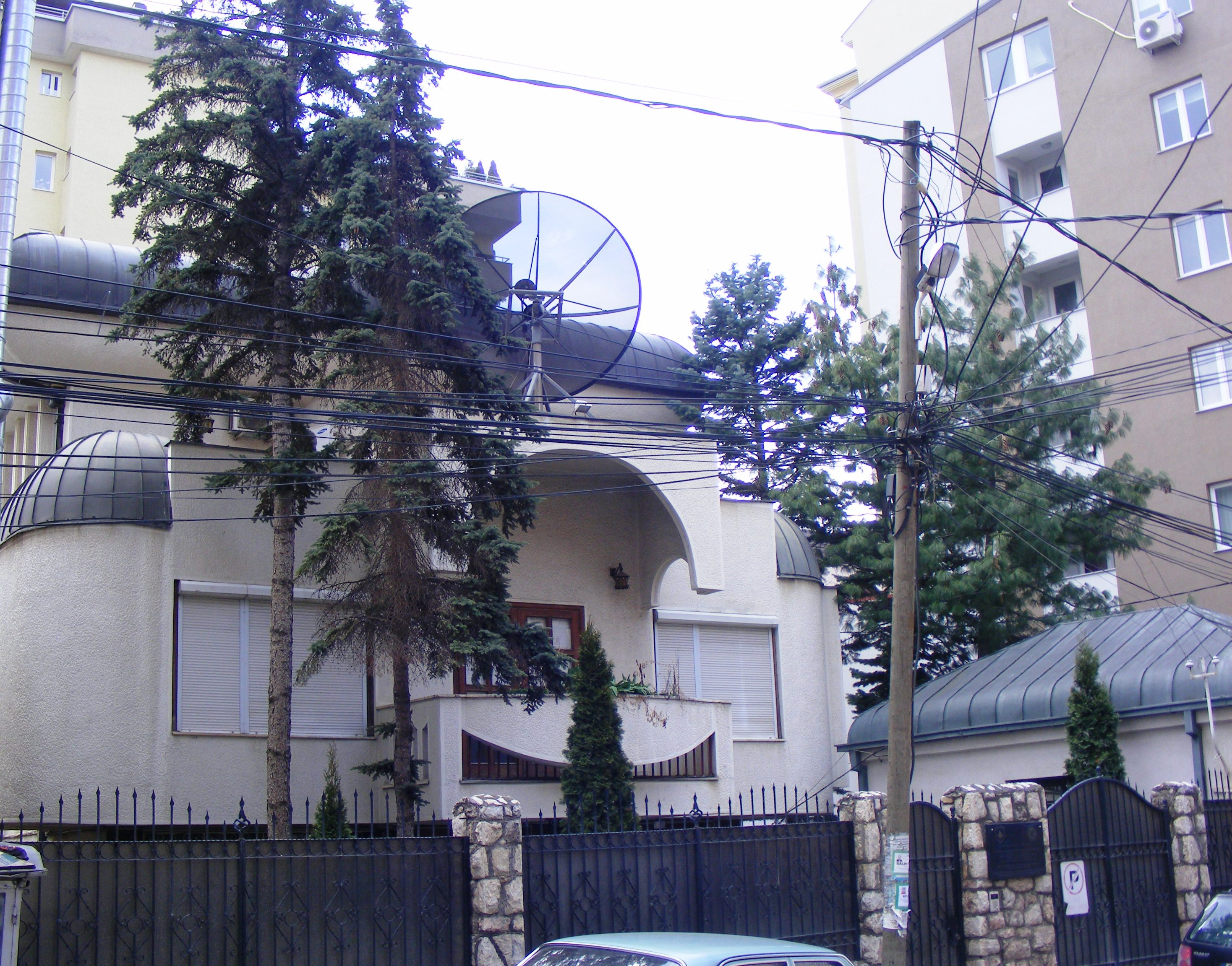 Shtëpia e veprimtarit të shquar- avokatit Bajram Kelmendi, i cili u ekzekutua me dy djemt e tij nga pushteti serb.